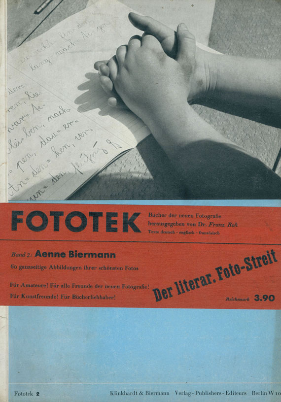 Aenne Biermann: 60 Fotos. Mit Einleitung von Franz Roh "Der literarische Foto-Streit". Berlin, Klinkhardt & Biermann (1930). (= Fotothek Band 2). Mit Orig.-Bauchbinde in Rot. 24,5:17 cm